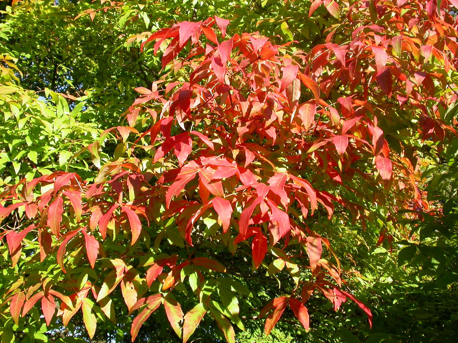 Acer triflorum fall leaves